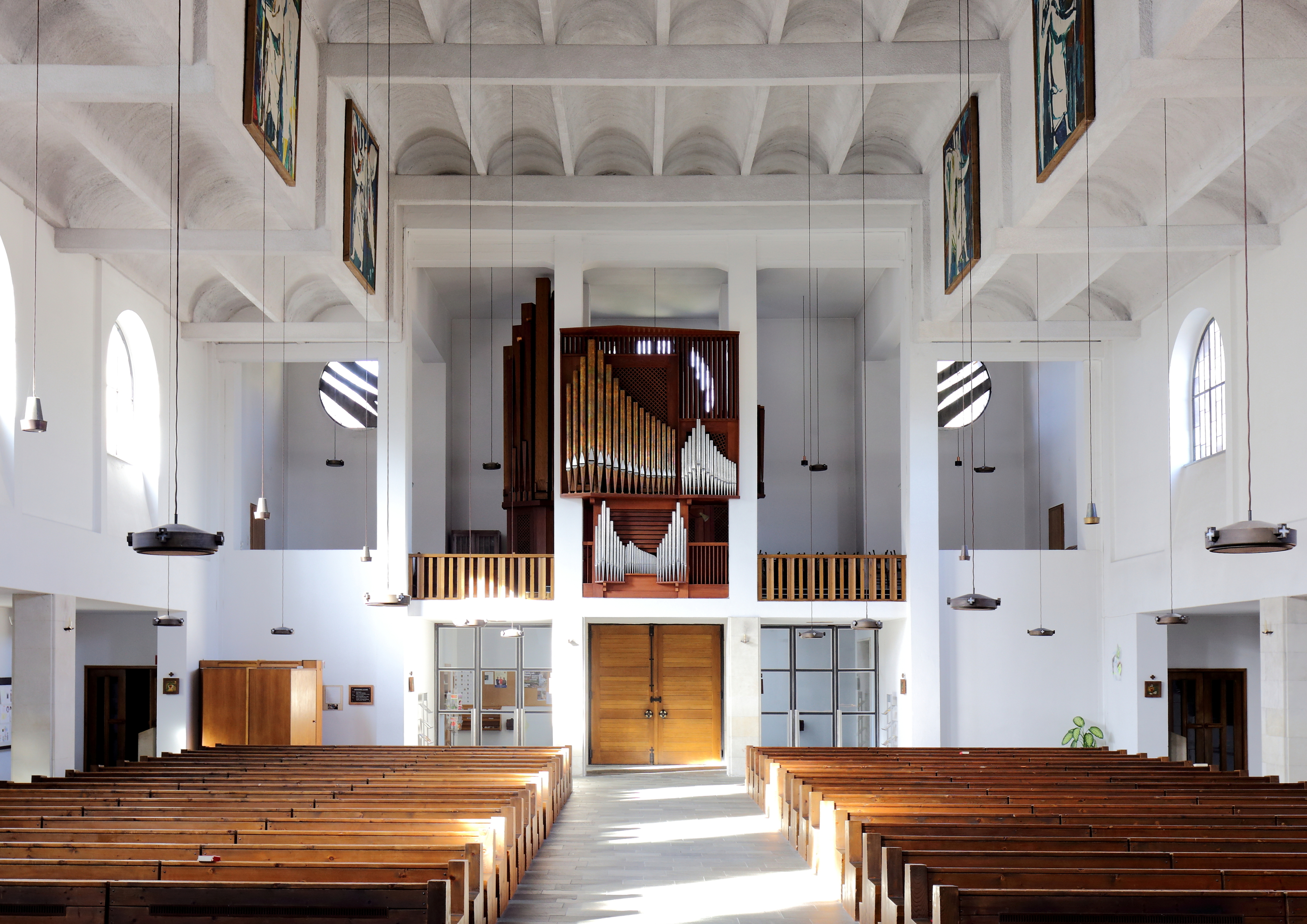 Innenansicht Richtung Orgelempore der katholischen Pfarrkirche Zum Christkönig in der niederösterreichischen Stadt Gloggnitz. Die Kirche wurde nach Plänen von Clemens Holzmeister errichtet. Baubeginn war 1933, jedoch nach einer Unterbrechung erst 1962 fertiggestellt. Die Orgel ist ein Werk von Josef Mertin aus dem Jahr 1971.